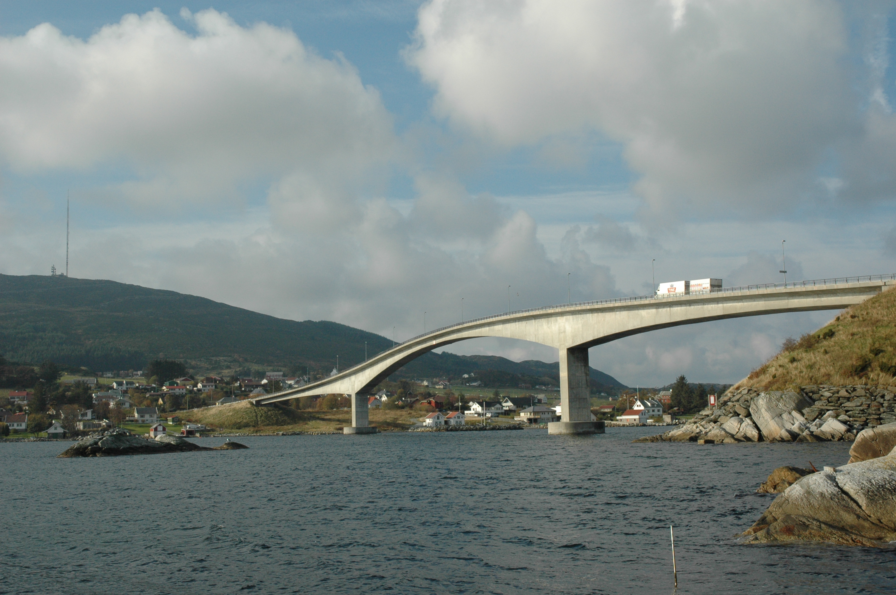 Boknasundbrua